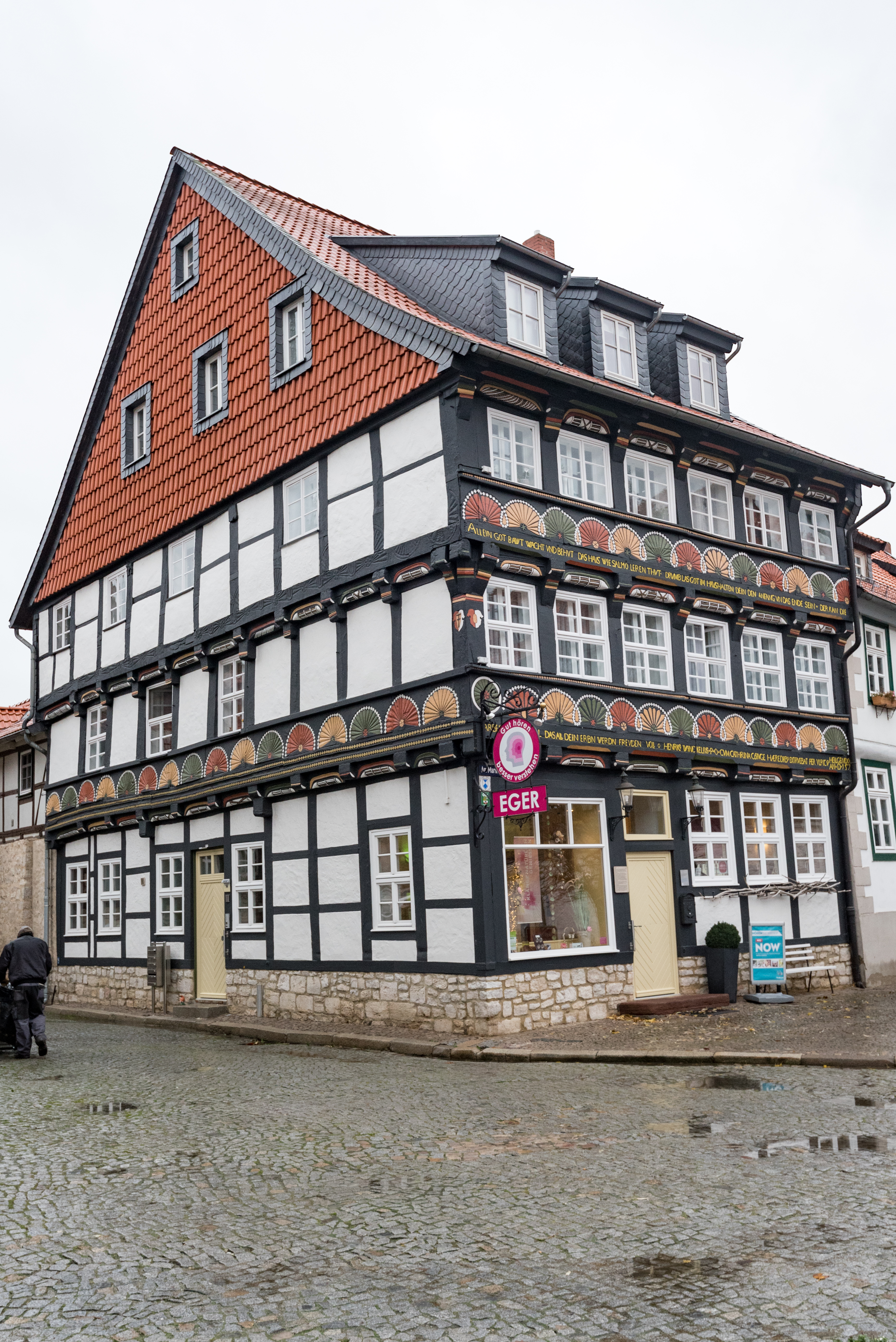 Osterwieck, Am Markt 14